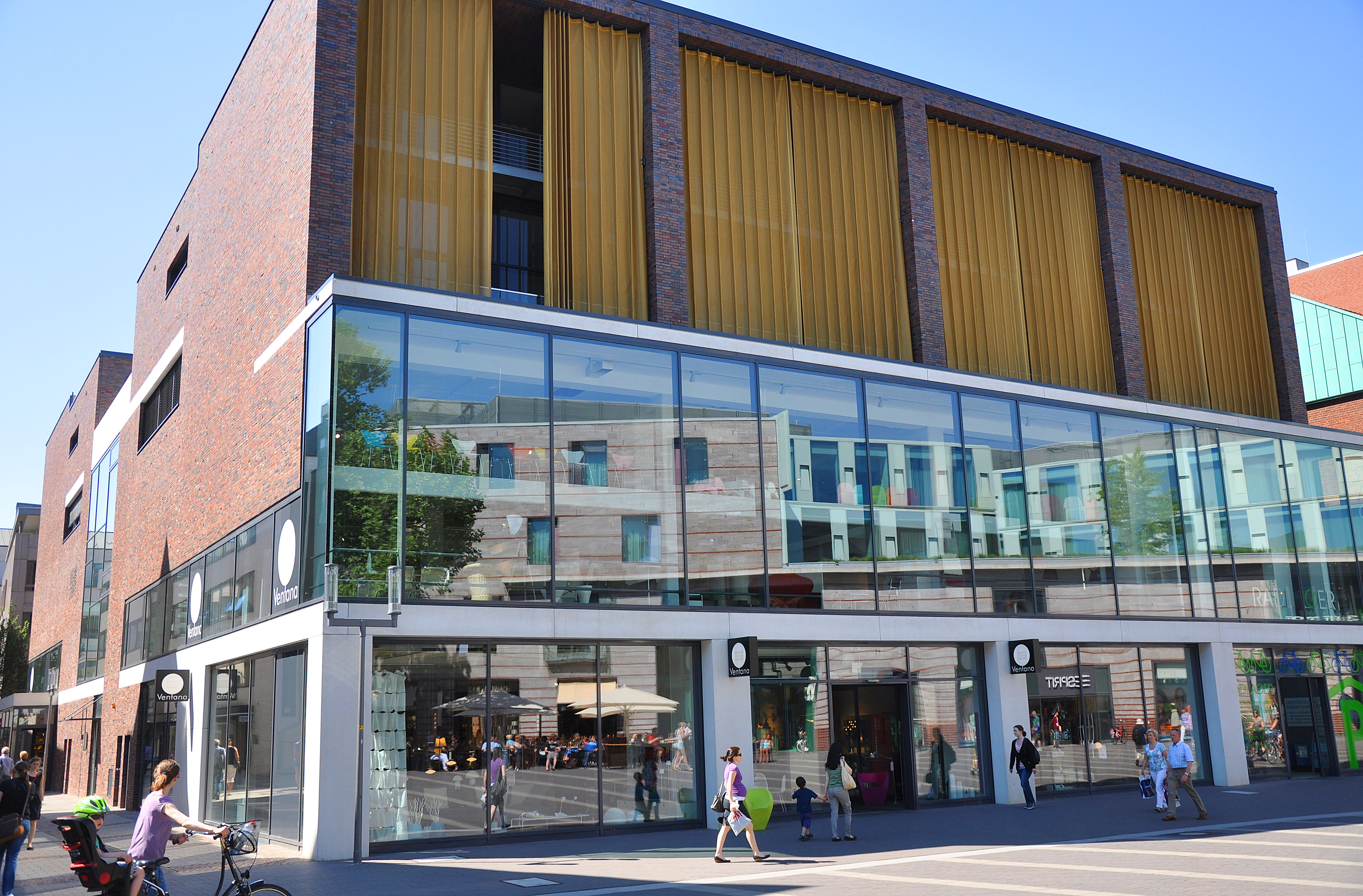 Das frühere Auto-Parkhaus an der Stubengasse in Münster wurde zu einem Wohn- und Geschäftshaus mit Fahrradparkhaus umgebaut.